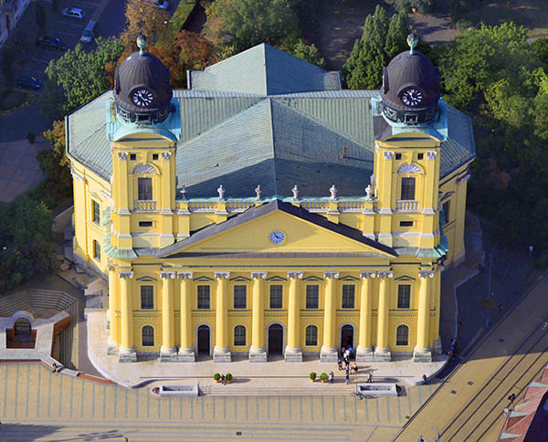 Debreceni református nagytemplom légi felvételen